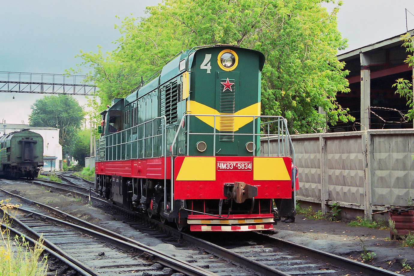 ЧМЭ3Т-5834